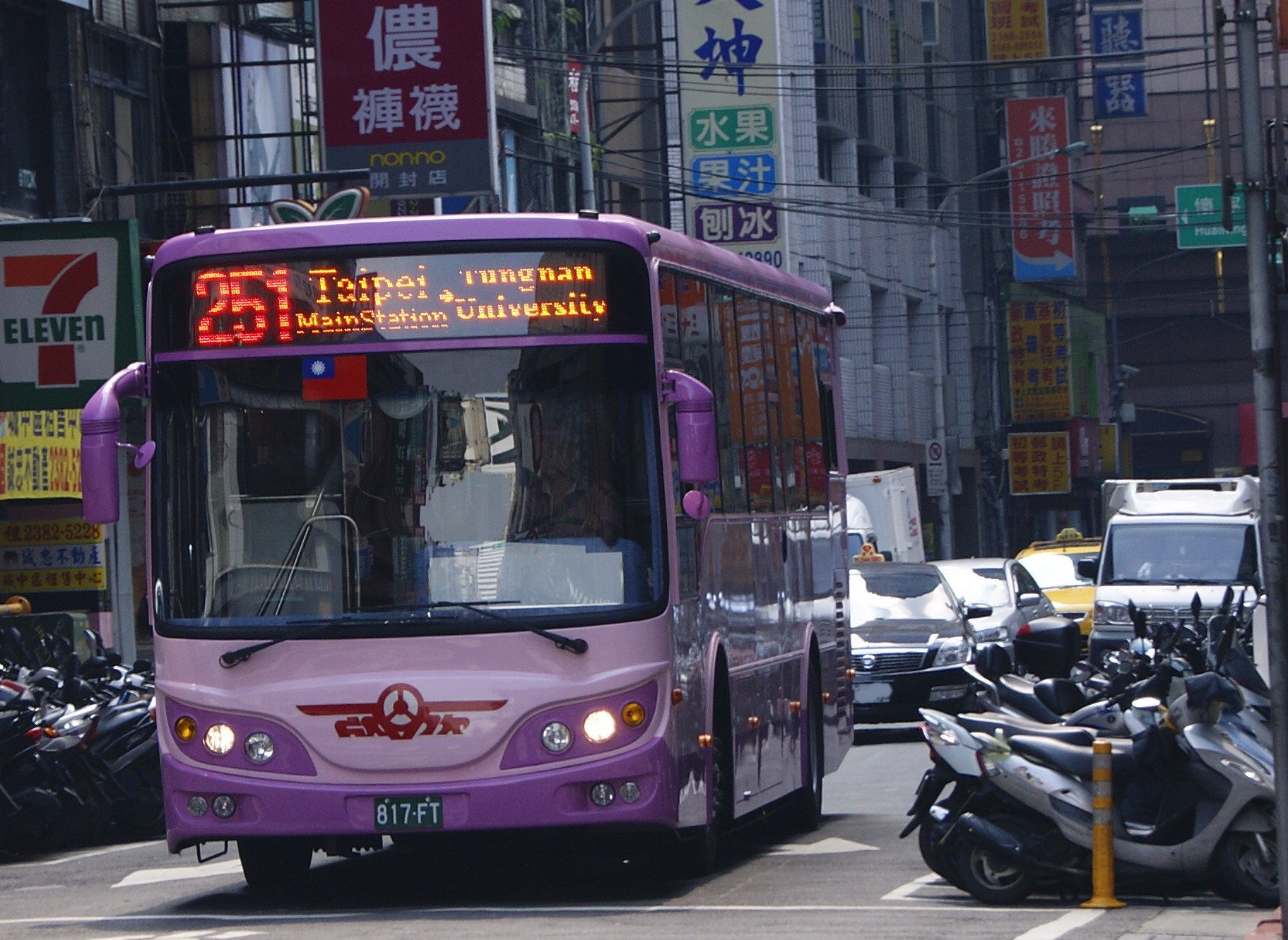 欣欣客運2013年日野大客車817-FT行駛臺北市聯營公車251線